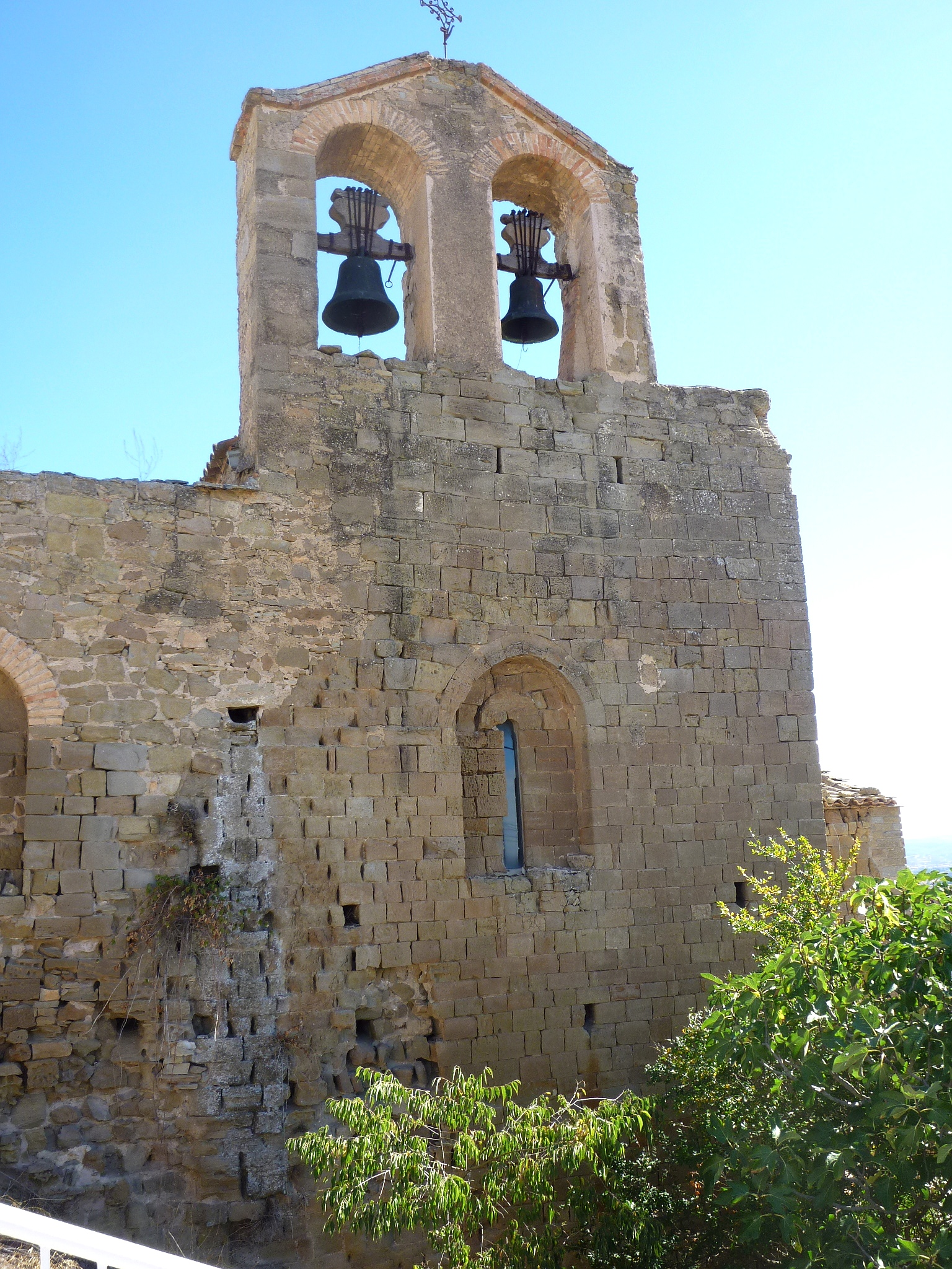 Església de Sant Pere de Talteüll (Massoteres): espadanya i façana sud